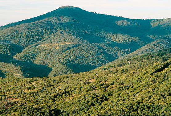 Mapa de la situación Actual del Parque Natural Sierra de Guadalupe.